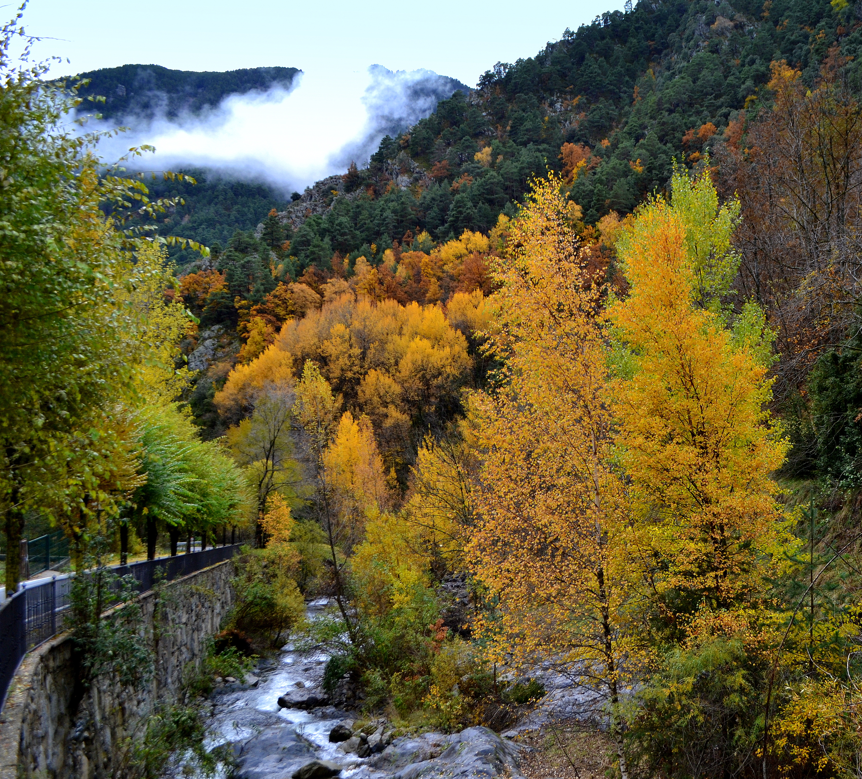 Riu d'Os This is a a photo of a river in Andorra with id: IEA-R-13